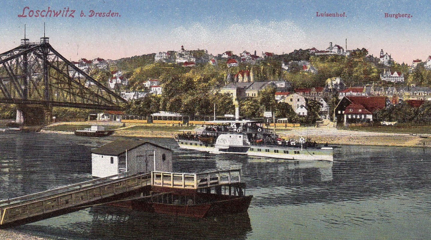 Raddampfer Rathen am „Blauen Wunder“. Postkarte